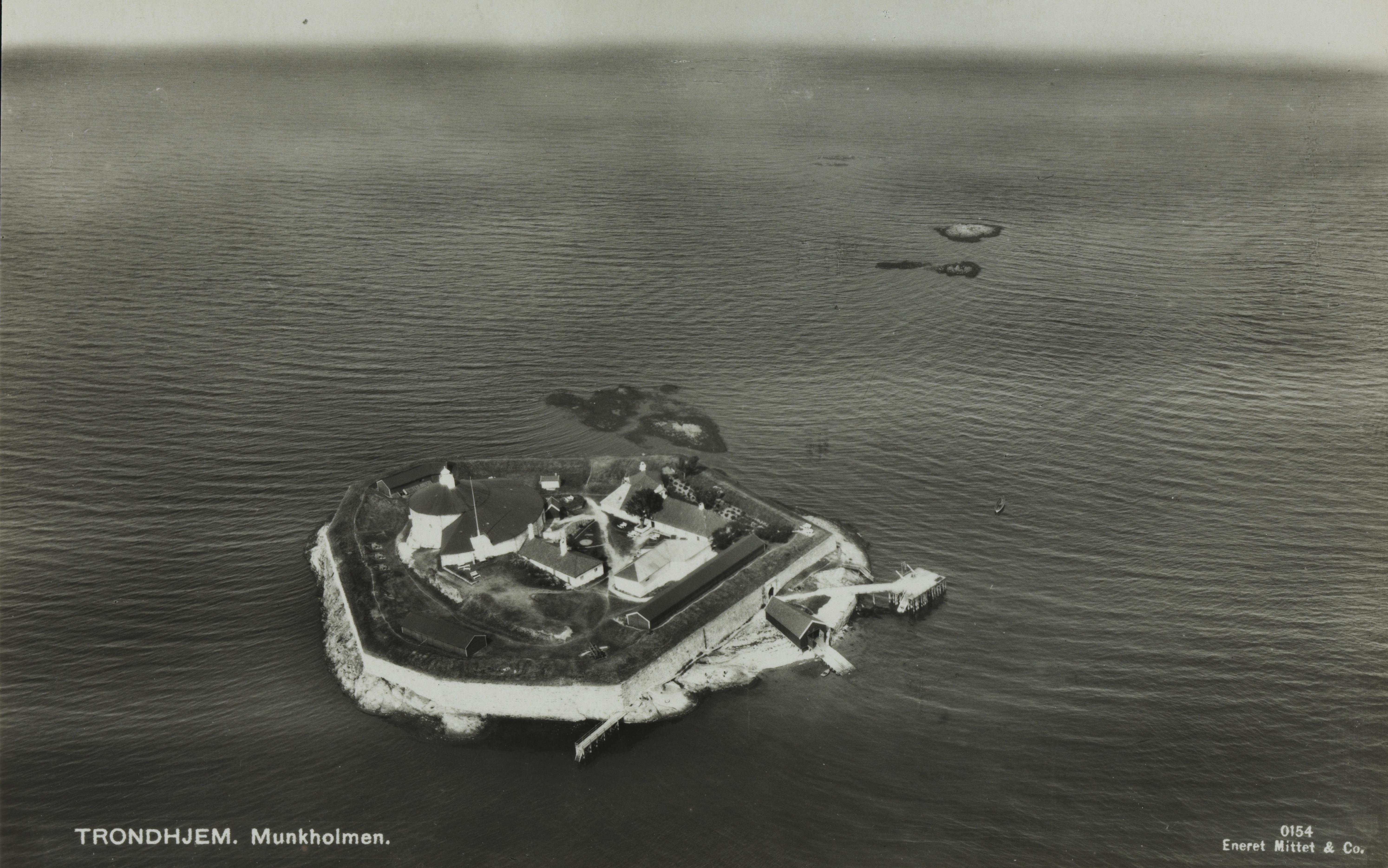 Bildet er hentet fra Nasjonalbibliotekets bildesamling Munkholmen, Trondheim, Sør Trøndelag